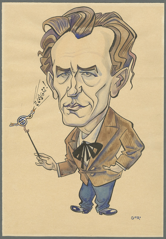 Tuudur Vettik